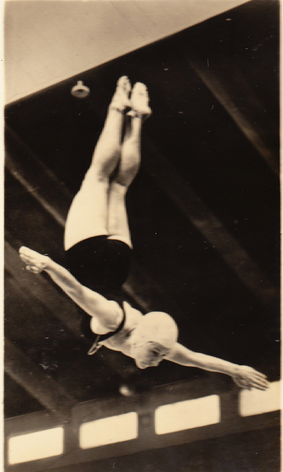 Mej. Tholen (thans Mevr. Inglis Arkell) kampioene schoonspringen.